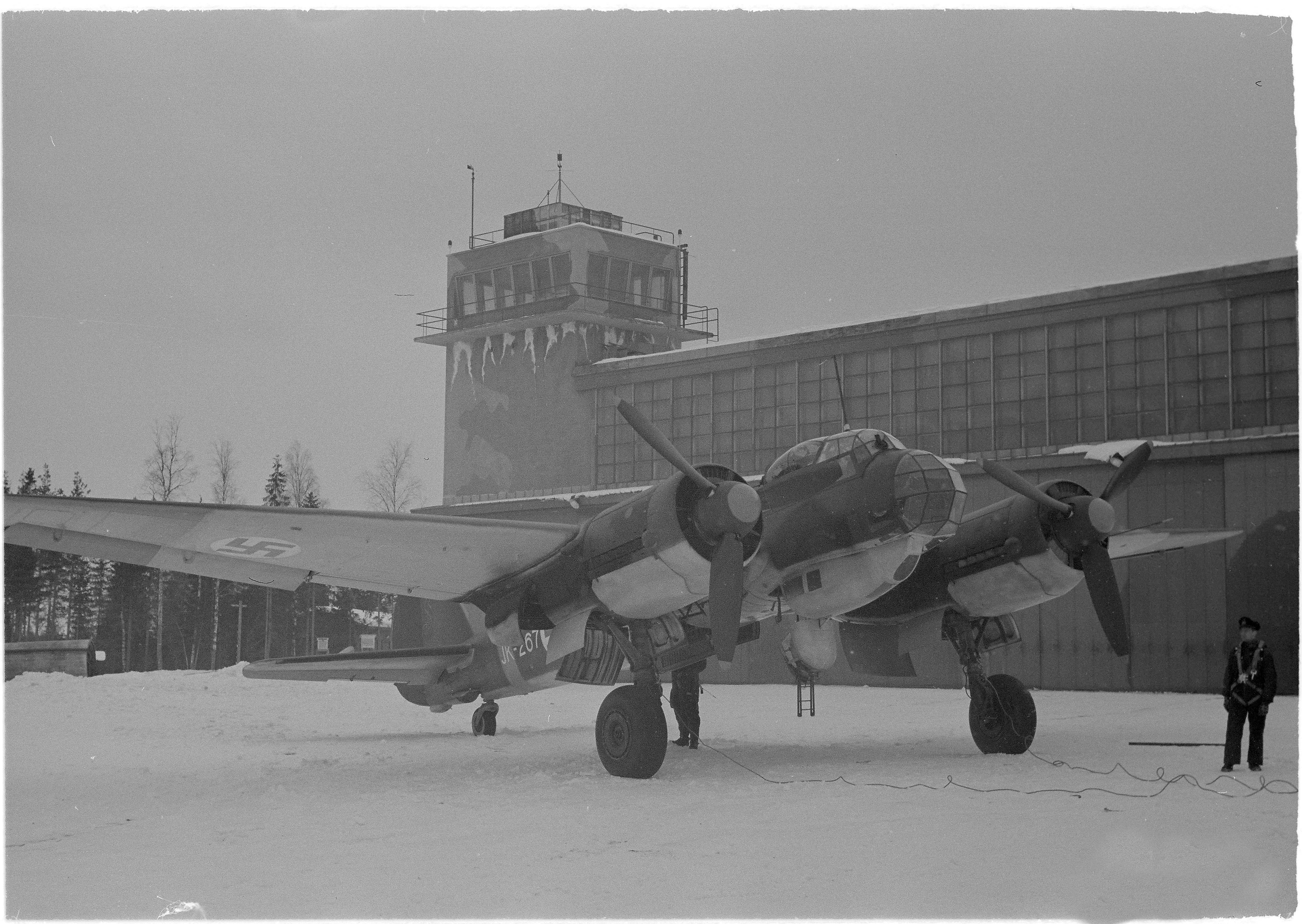 Traktori vetää JK-konetta kiitotielle. (Kuvassa on Junkers Ju 88A-4). Kuvauspaikka: Luonetjärven lentokenttä.